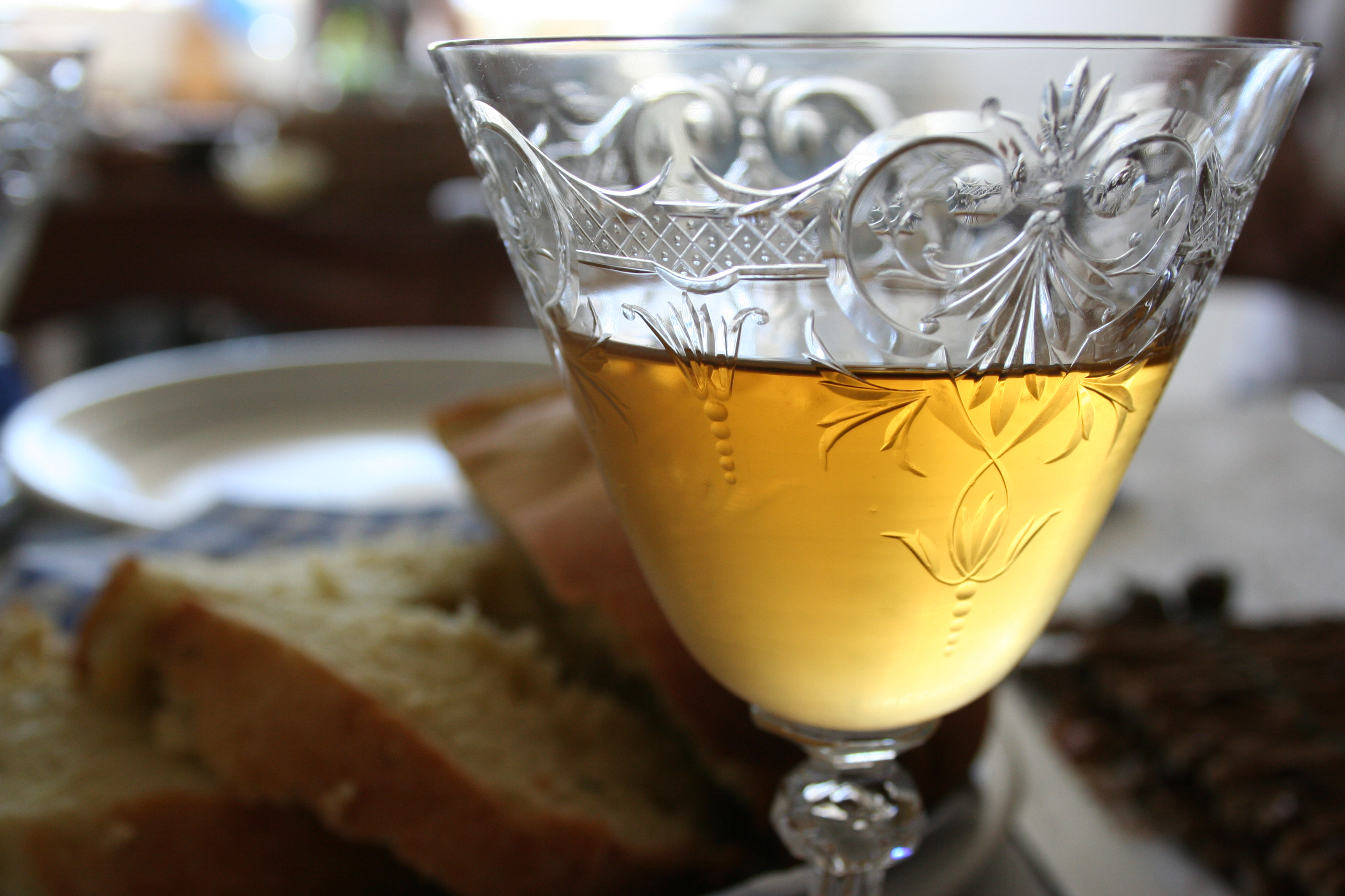 Cousiño-Macul Doña Isidora Riesling 1998